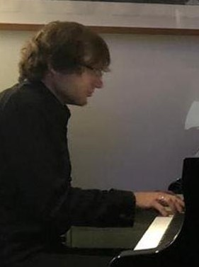 8 października 2019 Fundacja Pharos Art we współpracy z Ambasadą RP w Nikozji zorganizowała recital wybitnej, polskiej kompozytorki i wokalistki Agaty Zubel, której akompaniował na fortepianie utalentowany pianista młodego pokolenia Krzysztof Książek